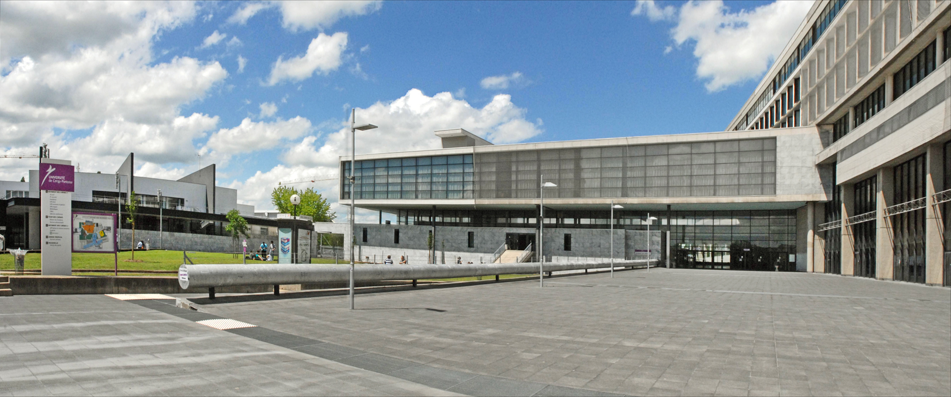 entrée du site des Chênes de l'université de Cergy-Pontoise